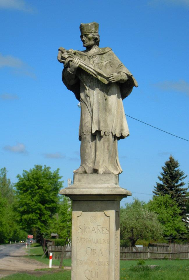 Kapliczka św. Jana Nepomucena na rozwidleniu dróg, przy skręcie z Brzózy na Głowaczów i Ryczywół.